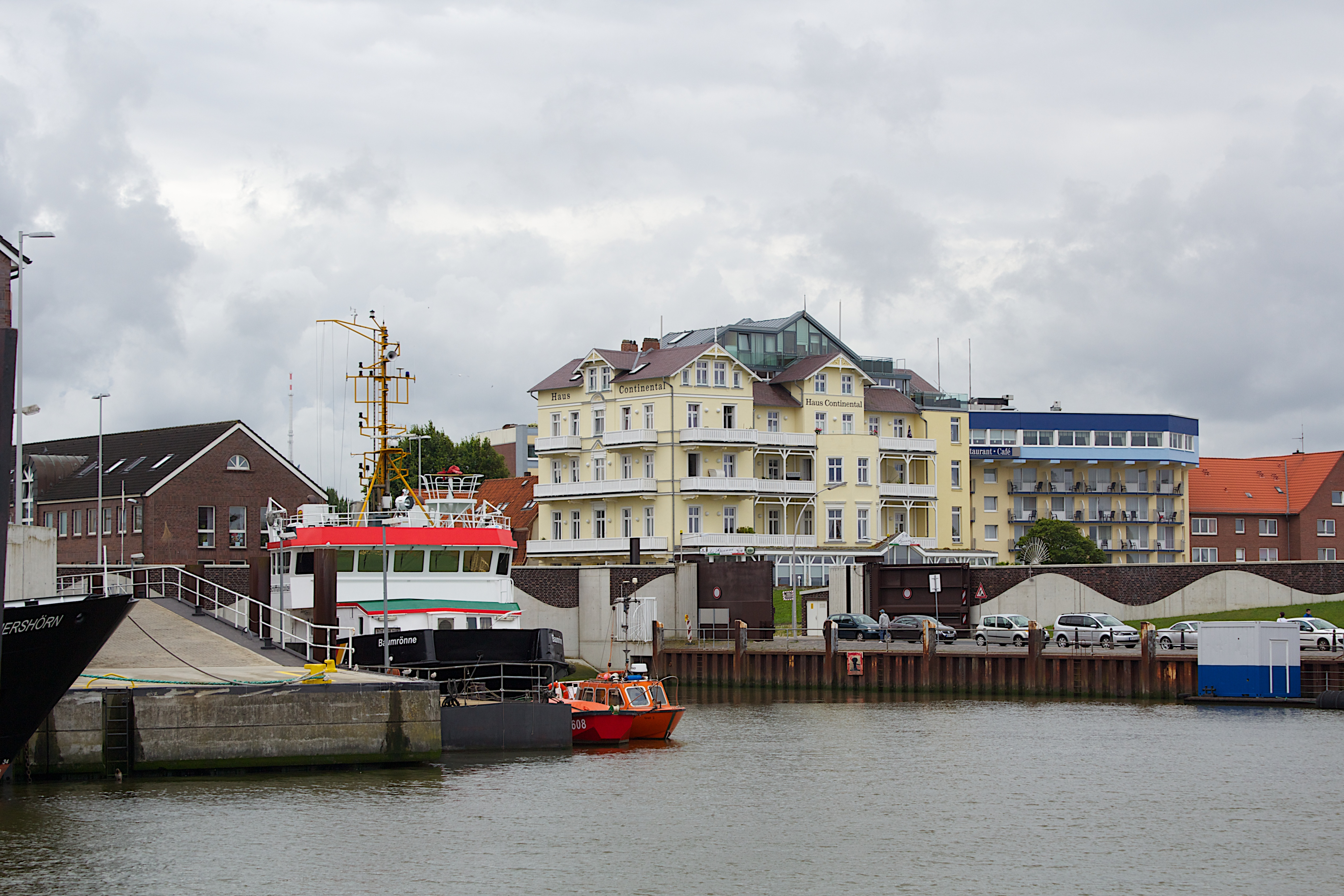 Hafen